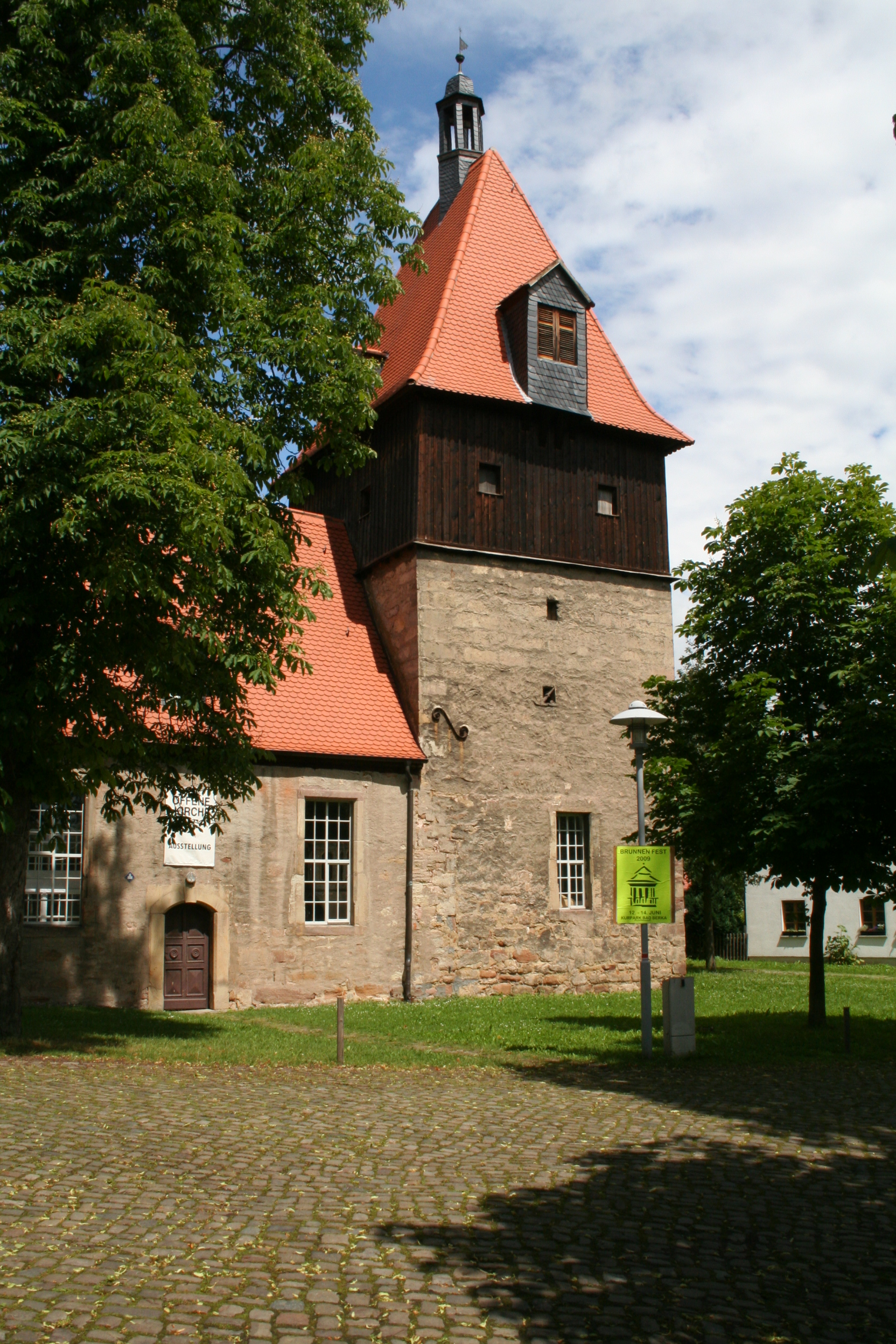 Die St.-Nicolaus-Kirche in Tiefengruben